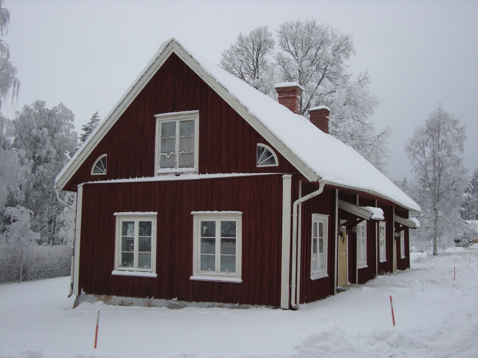 Sockenstugan med personalutrymmen Mosjö kyrka, Närke